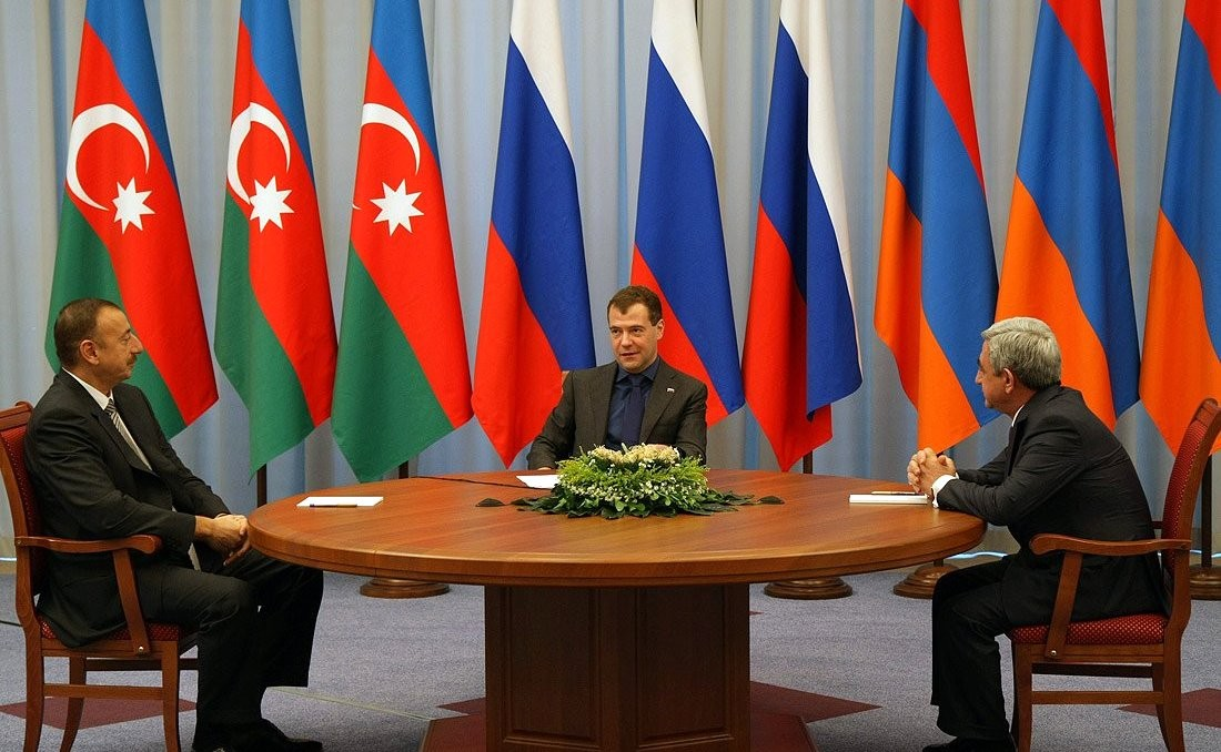 Встреча с президентами Азербайджана и Армении в Астрахани.